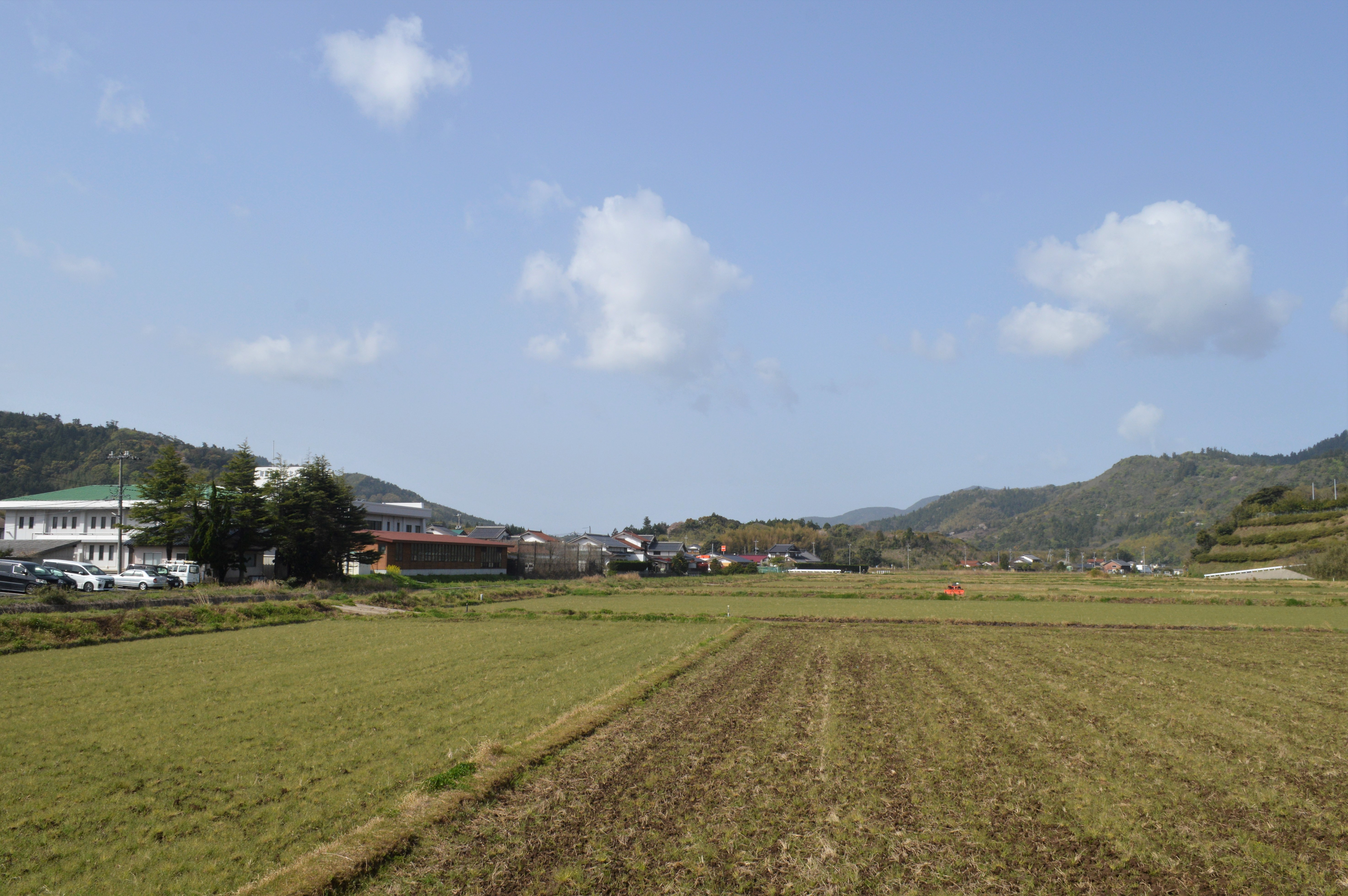 島根県隠岐郡海士町の隠岐開発総合センター（左中央）とその周辺の景観。